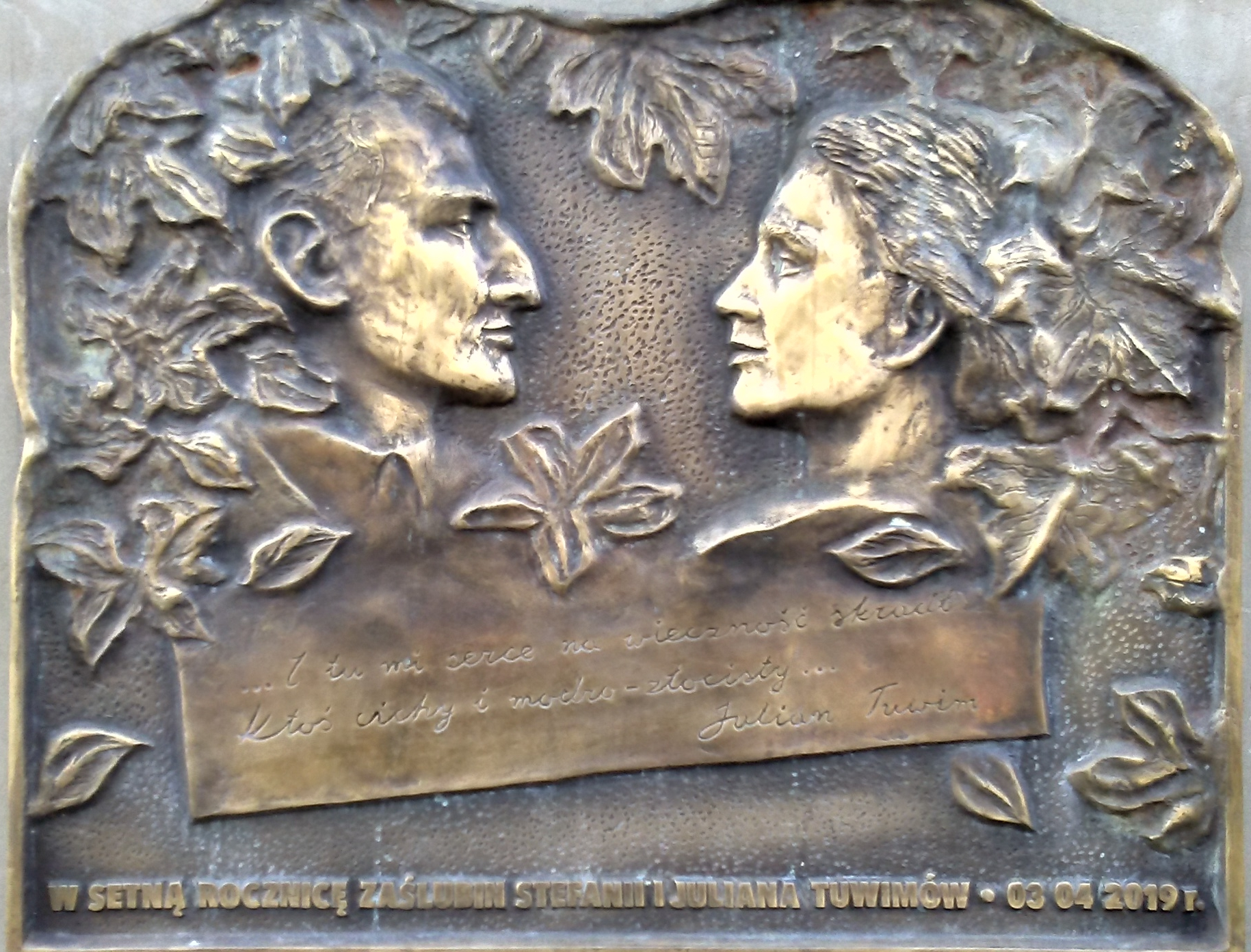 Tomaszów Mazowiecki w województwie łódzkim, PL, EU. Tablica Tuwimów na ścianie kamienicy przy ulicy Rzeźniczej vis a vis Galerii Arkady, CC0